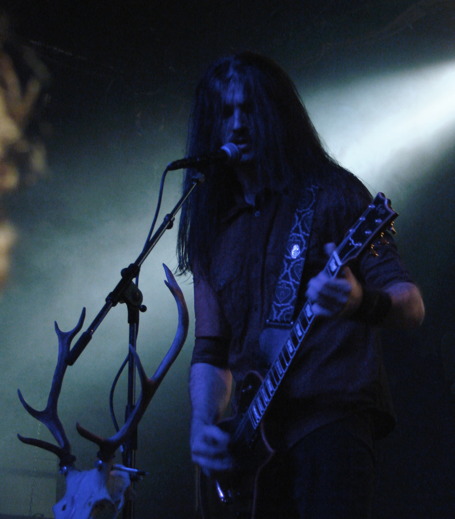 Vreid en concert à l'Elysée-Monmartre, Paris, le 2/12/2007. Sture: guitare et chant.